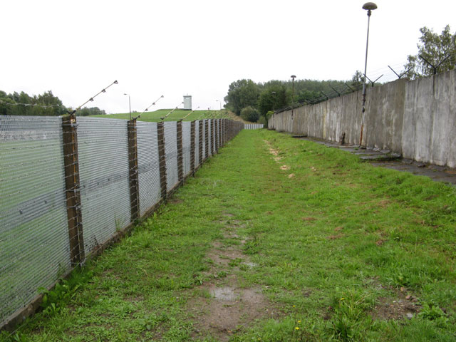 Elektrifizierter Zaun (Signalzaun): Ehemalige Hundelaufanlage zwischen Hinterlandmauer und Grenzsignalzaun.